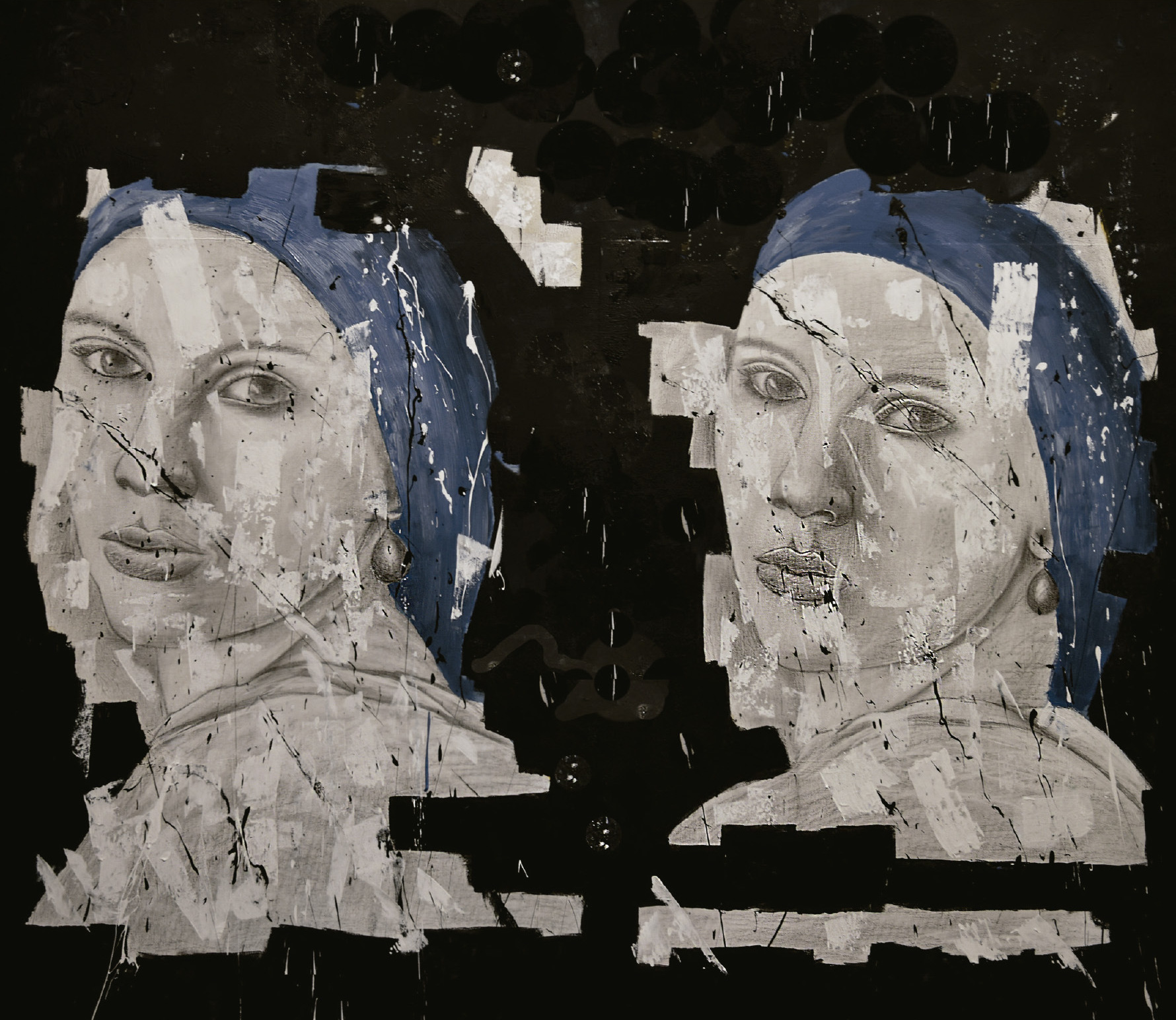 2016 . técnica mista .160x180x4cm . Colecção Particular